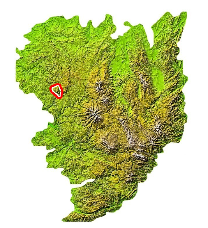 Situation des Monédières sur la carte du Massif central